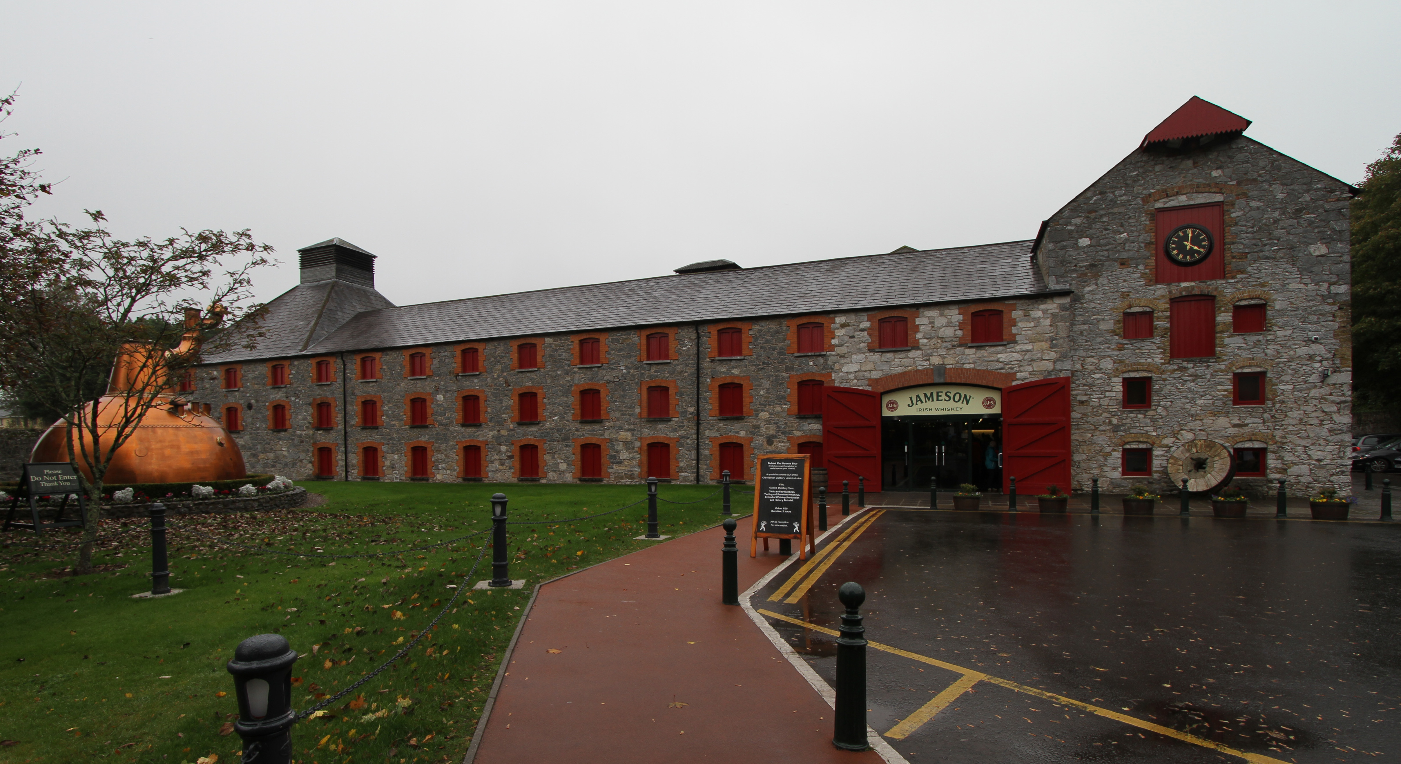 Jameson Whiskey Distillery in Midleton